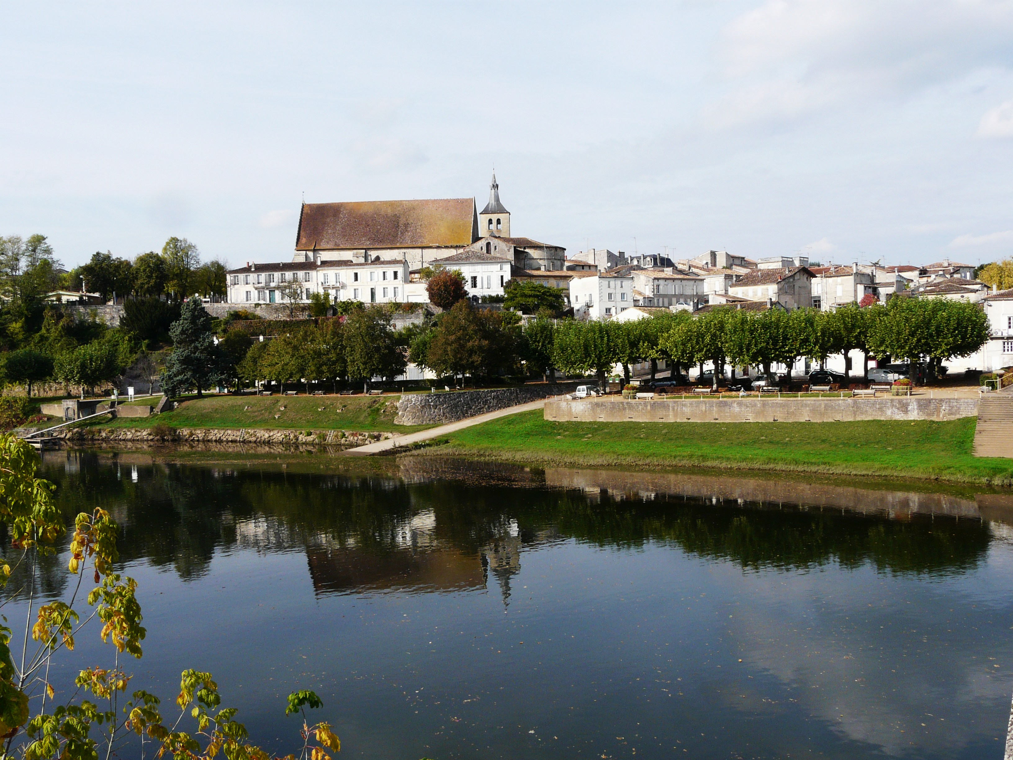 Sur les bords de l'Isle, Guîtres et son abbatiale Notre-Dame, Gironde, France Object location45° 02′ 24″ N, 0° 11′ 14.5″ W